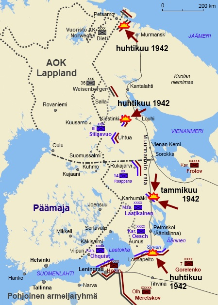 Jatkosodan puna-armeijan operatiiviset hyökkäykset asemasotavaiheessa 1942. Maaselän kannas (Karhumäki) tammikuussa 1942 Petsamo huhtikuussa 1942 Kiestinki huhtikuussa 1942 Syväri huhtikuussa 1942 Puna-armeijan kaikki hyökkäykset torjuttiin. Saksan armeijayksikkö tai rintamalinja Suomen armeijayksikkö tai rintamalinja Neuvostoliiton armeijayksikkö tai rintamalinja +++ Suomen valtiorajat: tumman harmaa 1940 (Moskovan rauha), vaalean harmaa 1920 (Tarton rauha) +-+ Saksan ja Suomen päämajojen välisten vastuualueiden raja.